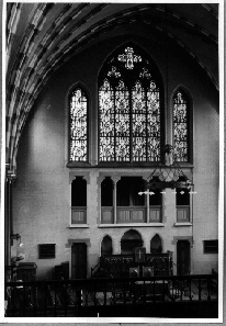 B: Innenaufnahme der 1867 erbauten Baptistenkirche in Hamburg, Böhmkenstraße 10 (im 2. Weltkrieg 1943 zerstört) Q: Archiv Helms L: public domain